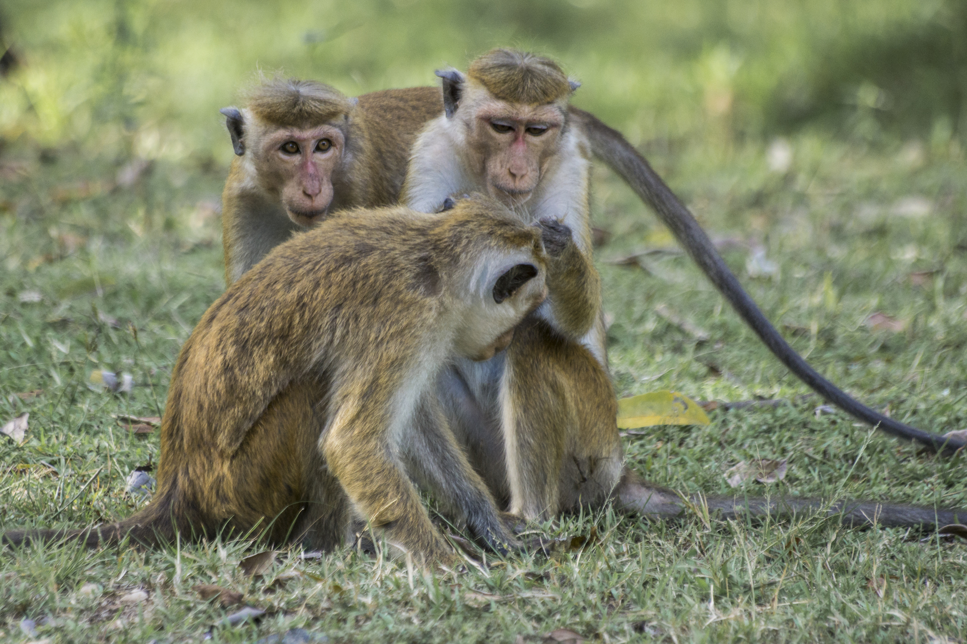 in Polannaruwa auf Sri Lanka